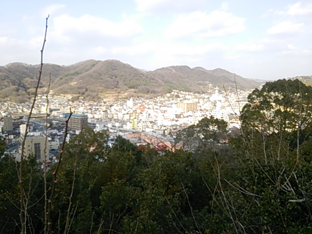 笠岡古城山公園より撮影した笠岡市街地(笠岡駅方向)